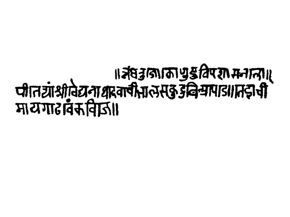 Marathi Shila lekh Year 1109 Found At Paral Maharashtra India